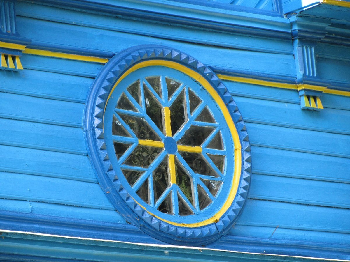 Дубай. Свята-Мікалаеўская царква